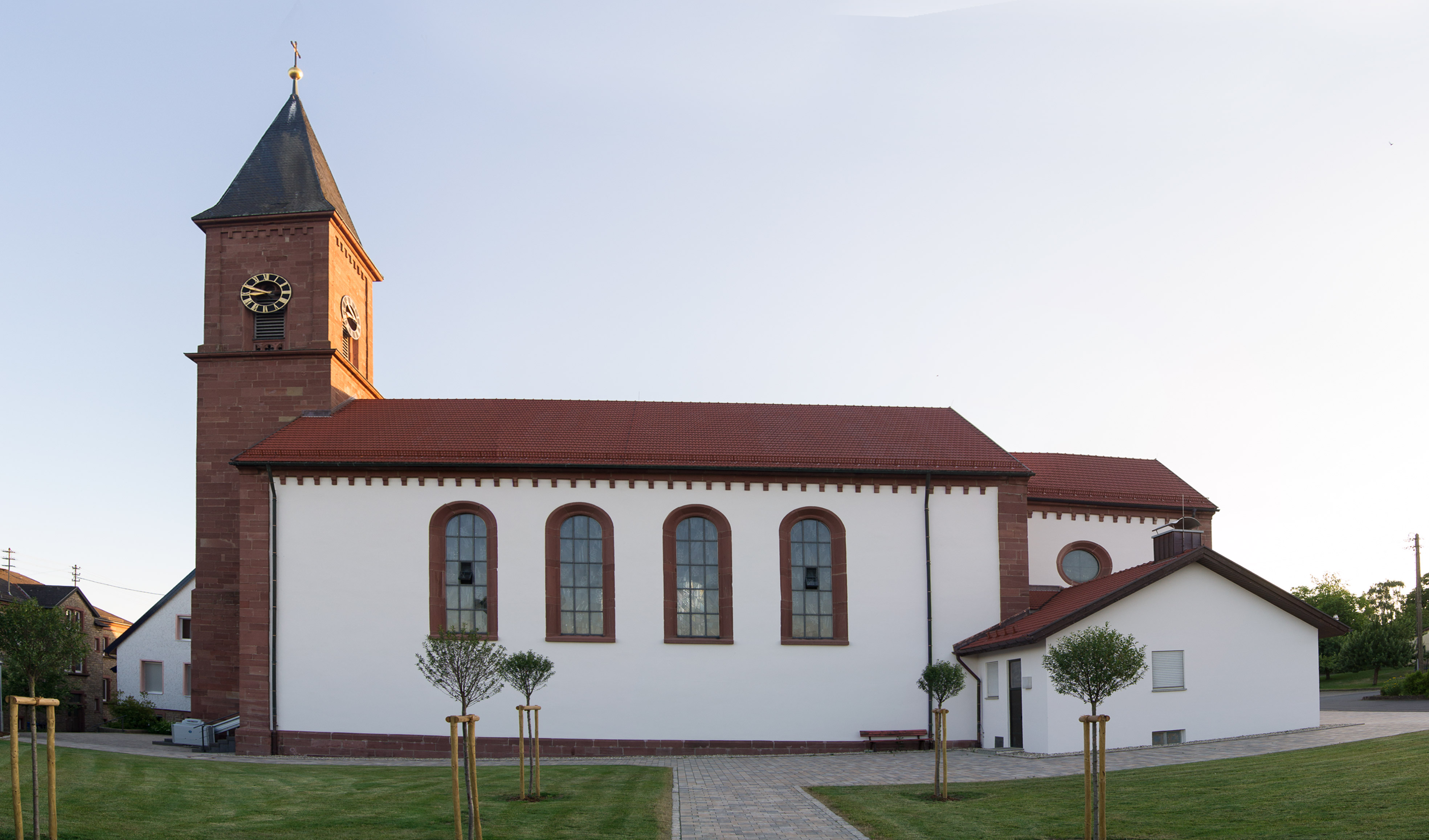 Ost Seite von St. Kilian